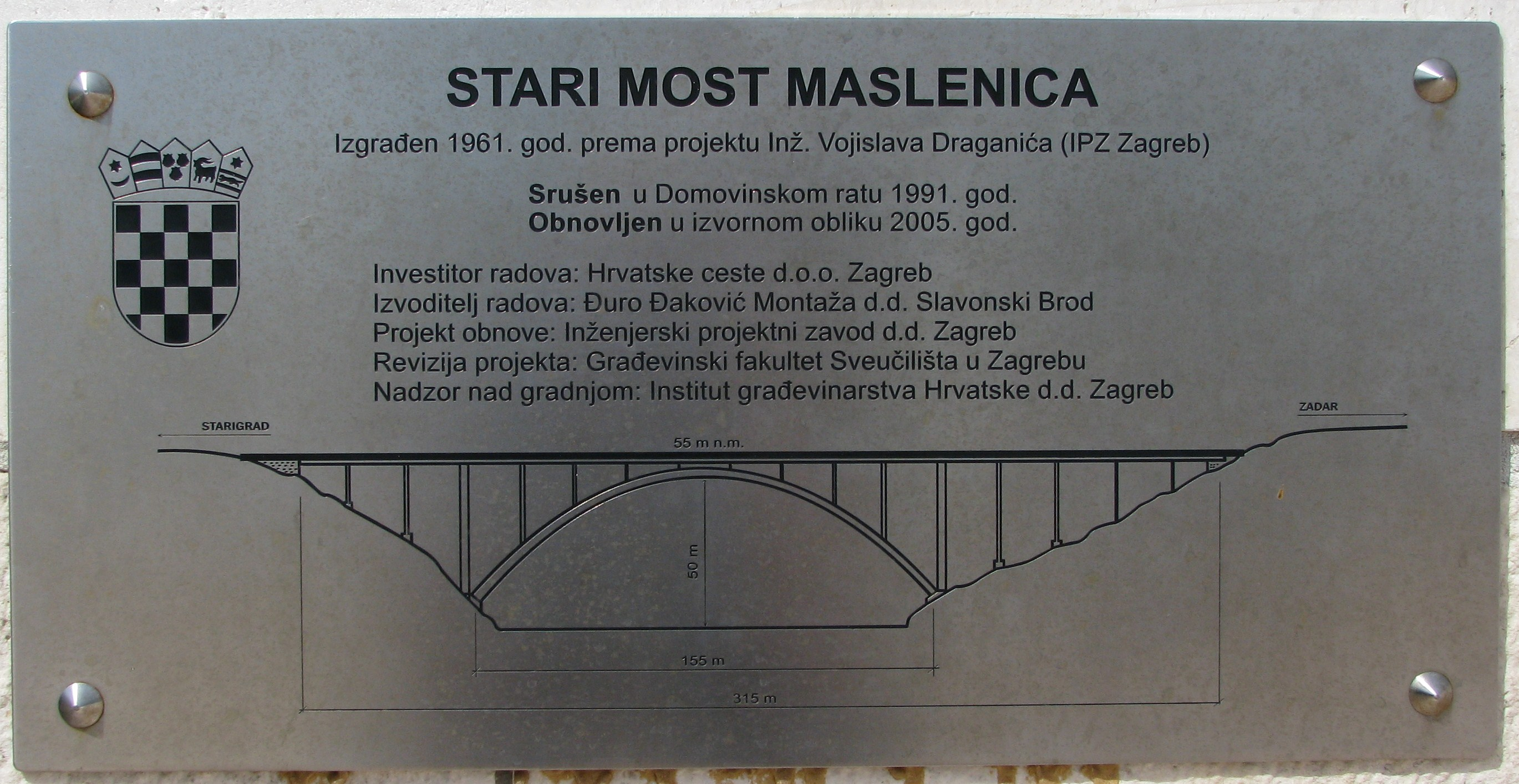 Ploča na Starom Masleničkom mostu